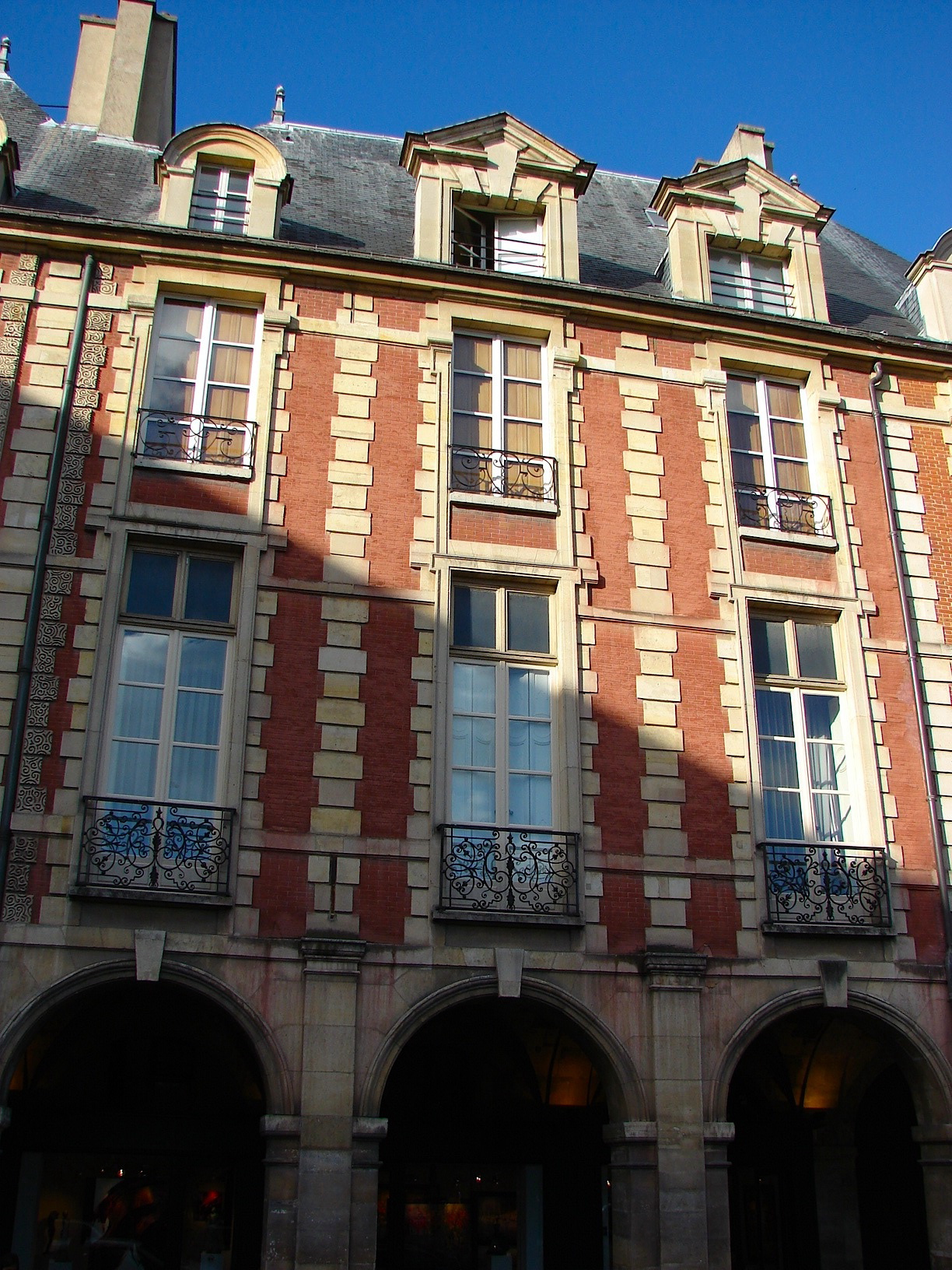 Hôtel du Cardinal de Richelieu - 21 Place des Vosges - Paris 3 Vue générale de la façade .